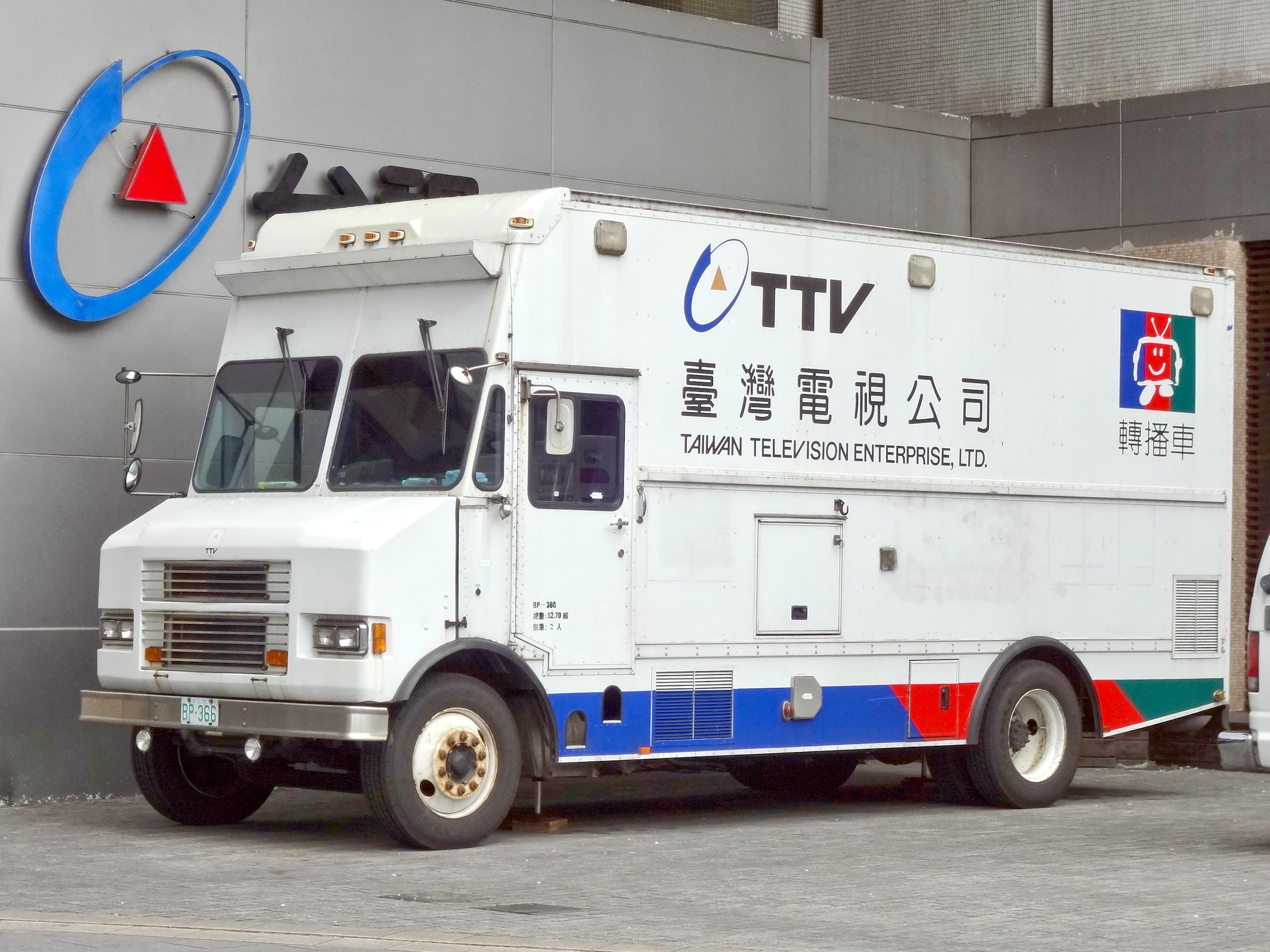 臺灣電視公司轉播車BP-366左前方外觀。